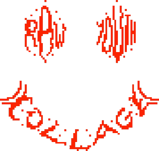 Logo de Raw Youth Collage.